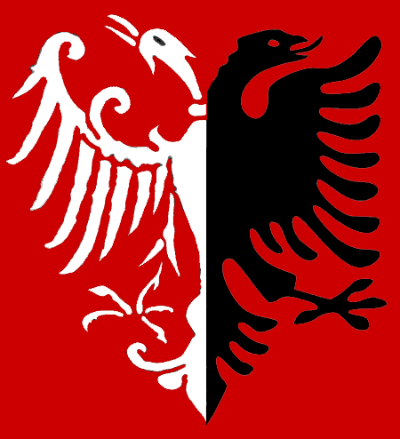 Srpski dvoglavi orao Nemanjića i albanski dvoglavi orao Skenderbega, oba nastala od vizantijskog dvoglavog orla. Slika je napravljena u Photoshopu kao ilustracija za članak o srpsko-albanskom prijateljstvu.